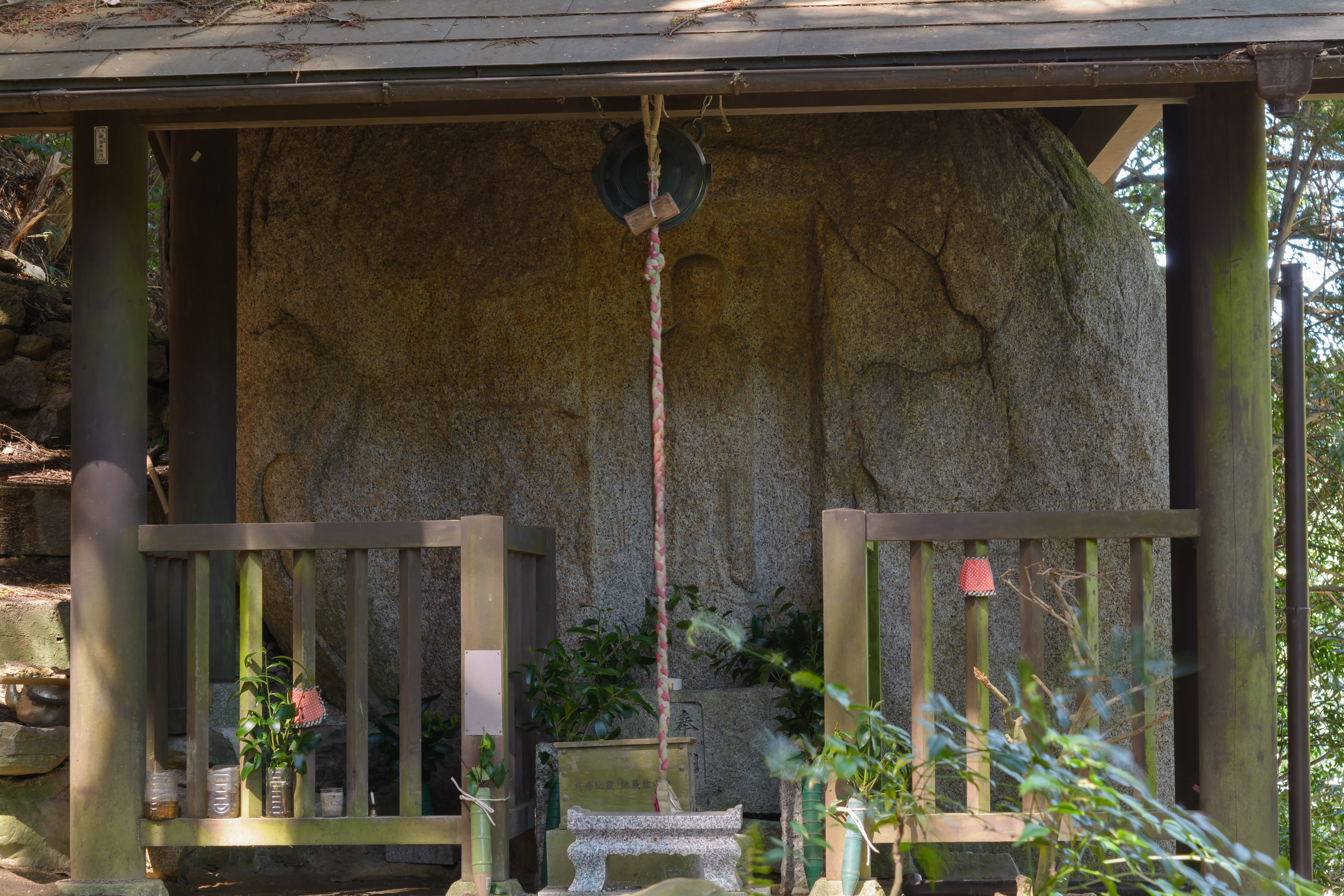 疱瘡地蔵（奈良市柳生町）、右下部に徳政碑文が刻まれている。